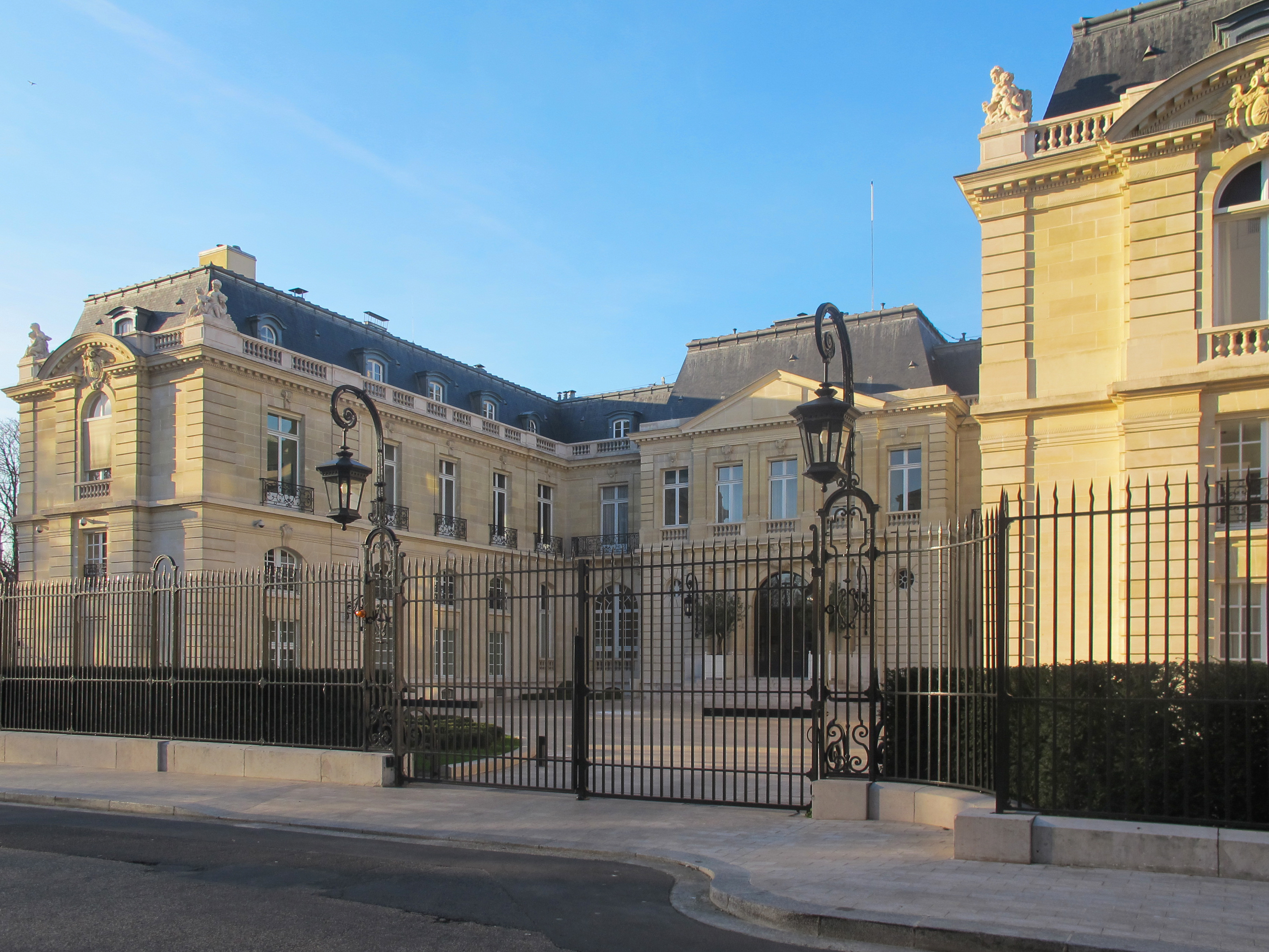 Château de la Muette.